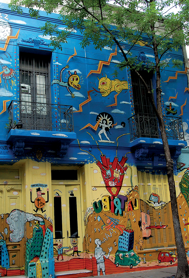 Fachada de FM La Tribu. Calle Lambaré 873. Ciudad de Buenos Aires. Mural.